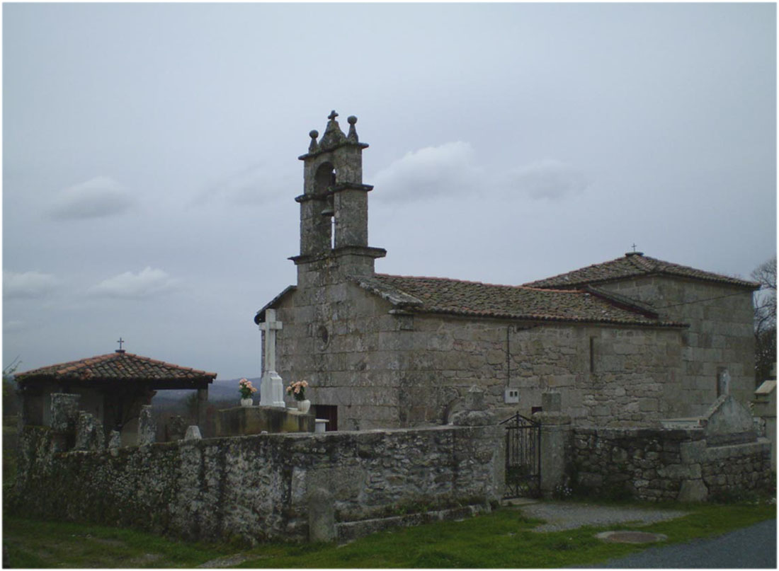 Igresa da parroquia de Árbol (Antas de Ulla)